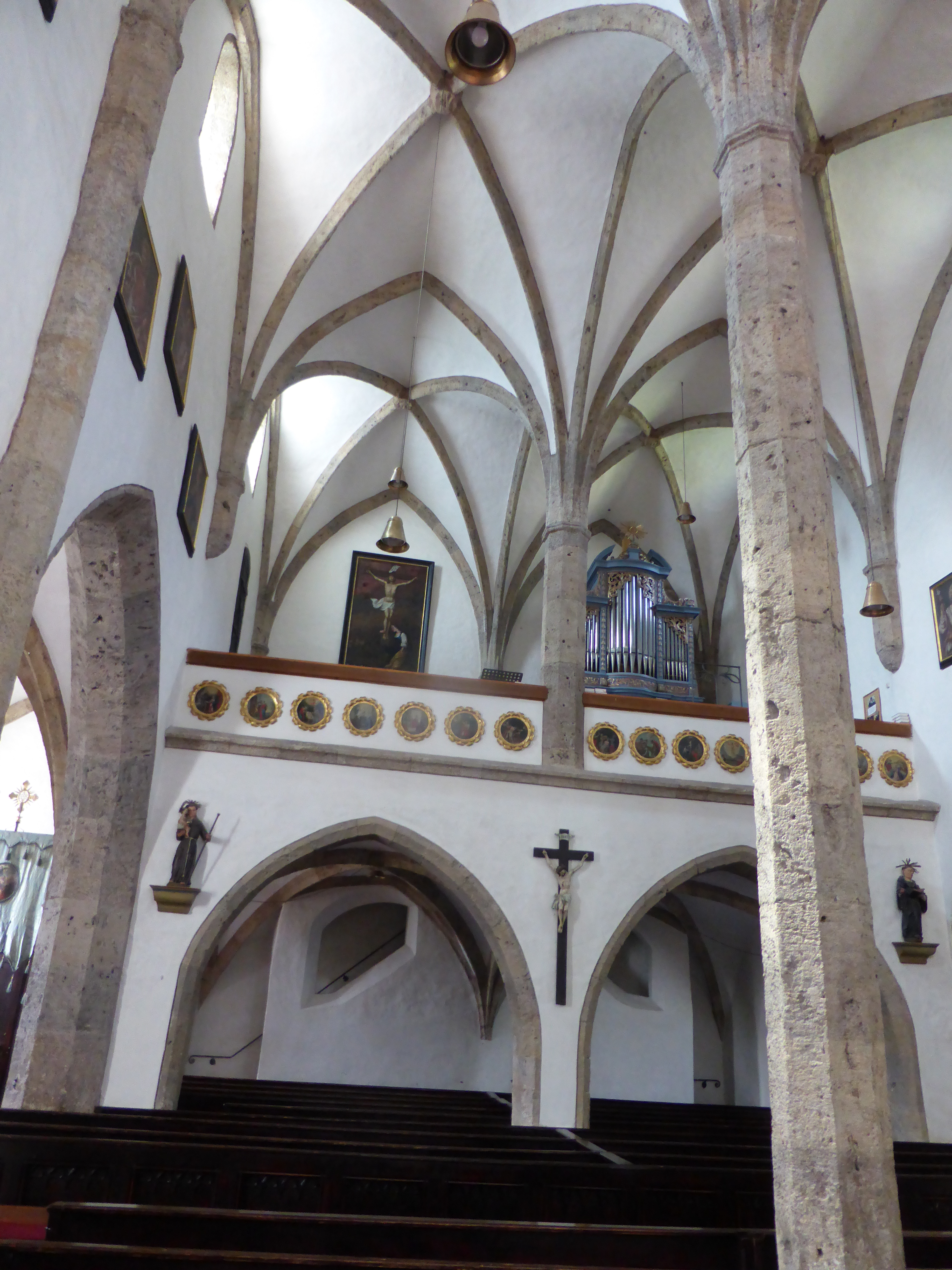 Kath. Pfarrkirche hl. Vitus-8